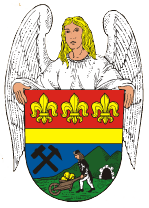 Znak obce Andělská Hora (okres Bruntál)